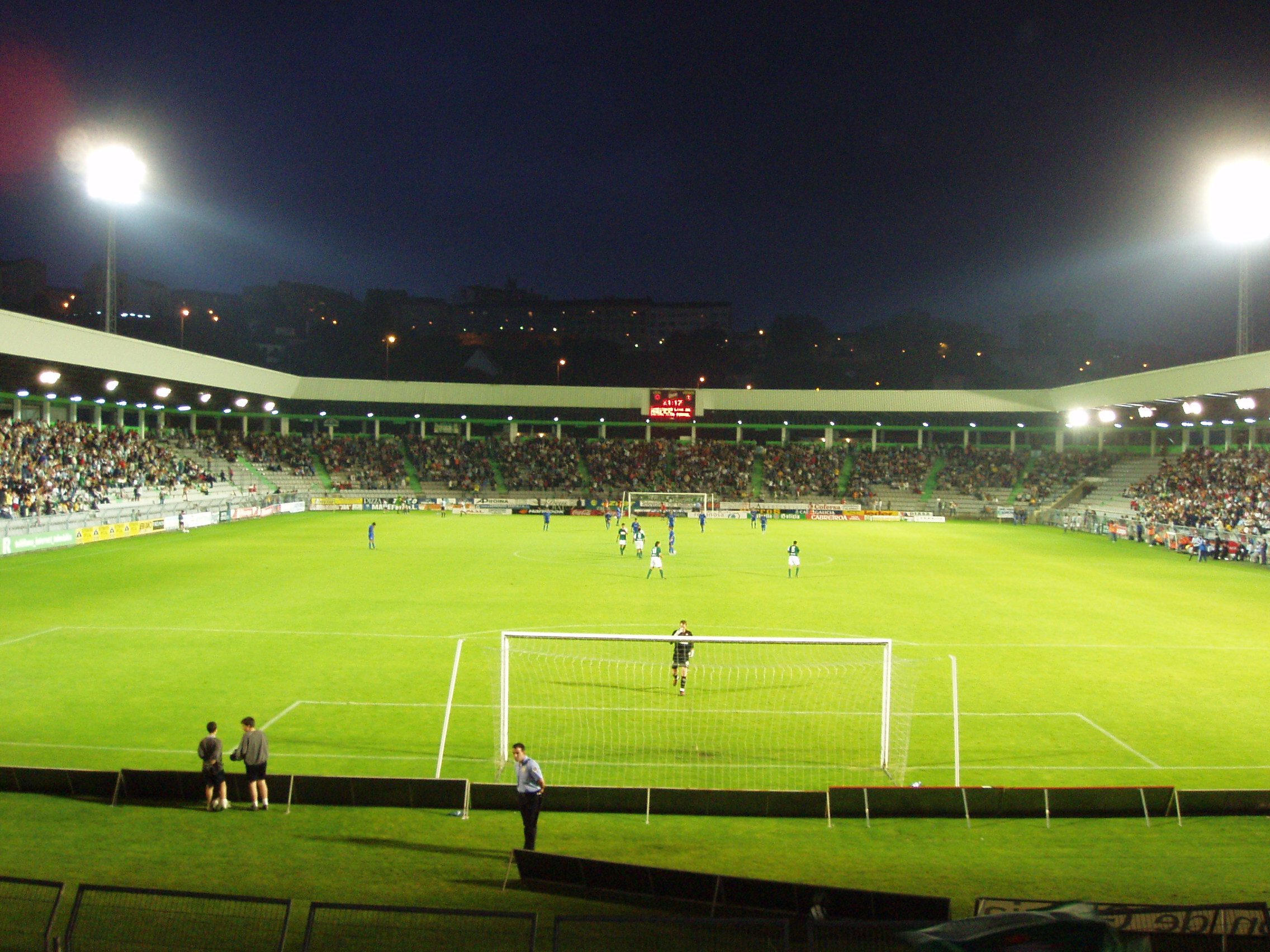 Encuentro Racing Club de Ferrol-Xerez CD disputado en junio de 2.005 en el Estadio Municipal A Malata de Ferrol.